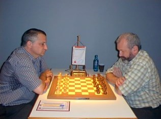 Michael Negele - Yuri Boidman, Open A des Dortmunder Sparkassen Chess-Meeting 2003 (8. Runde).